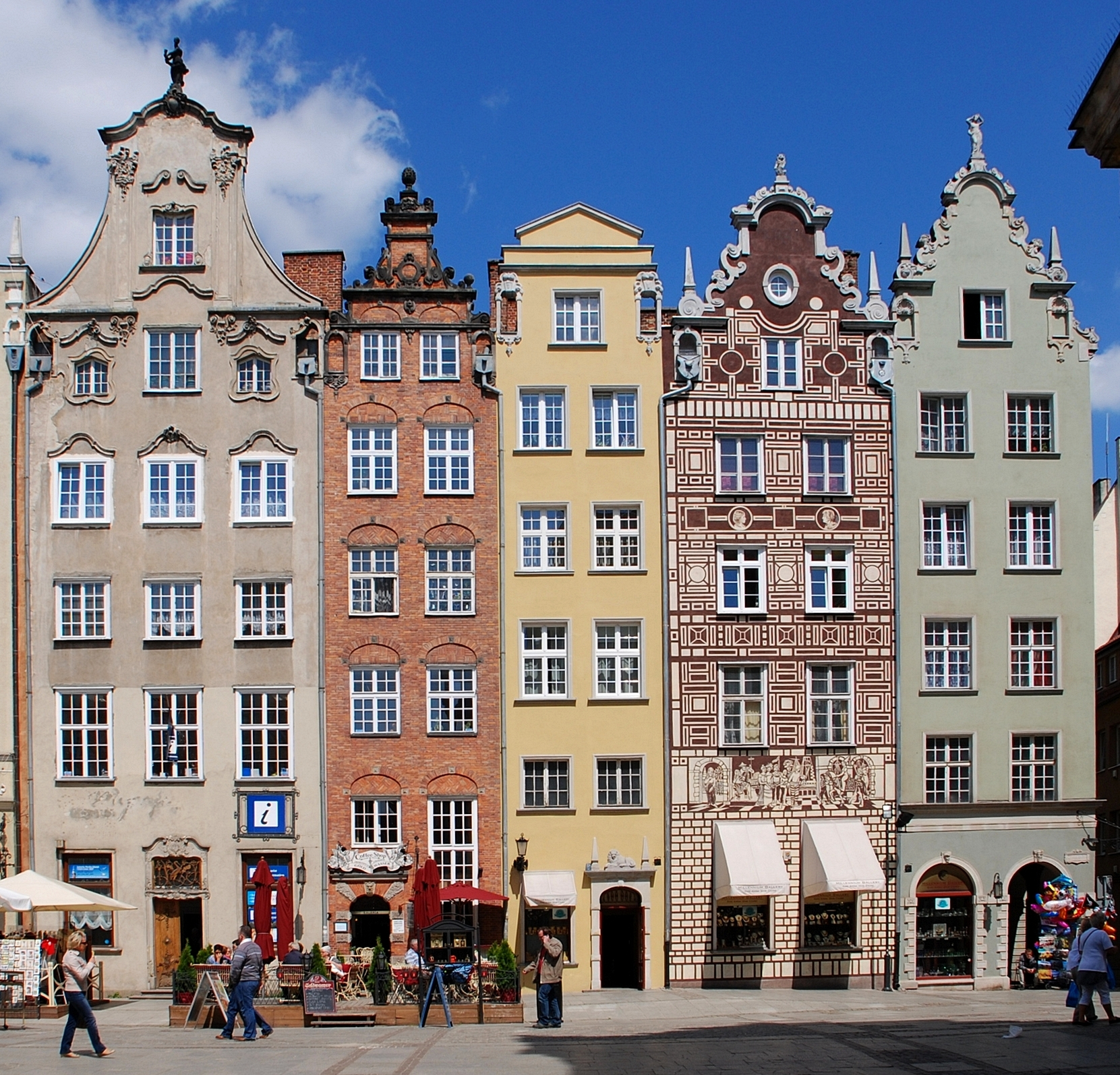 miasto Gdańsk